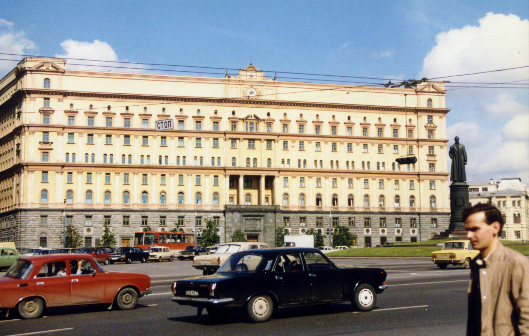 Lubyanka KGB HQ Moscow